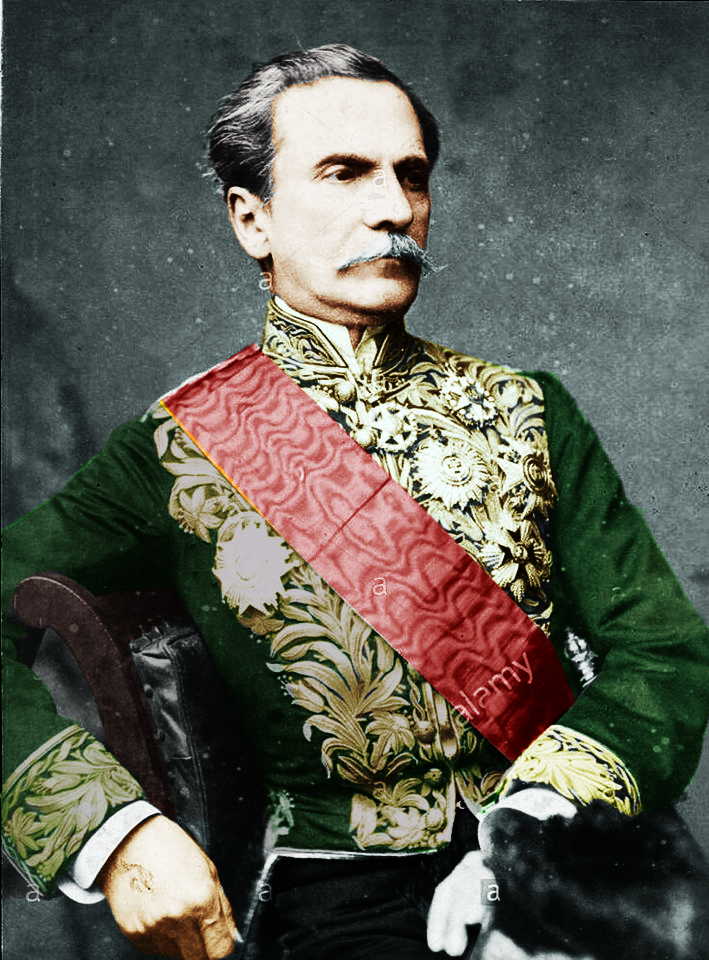 Fotografia digitalmente colorida do Barão de Penedo.